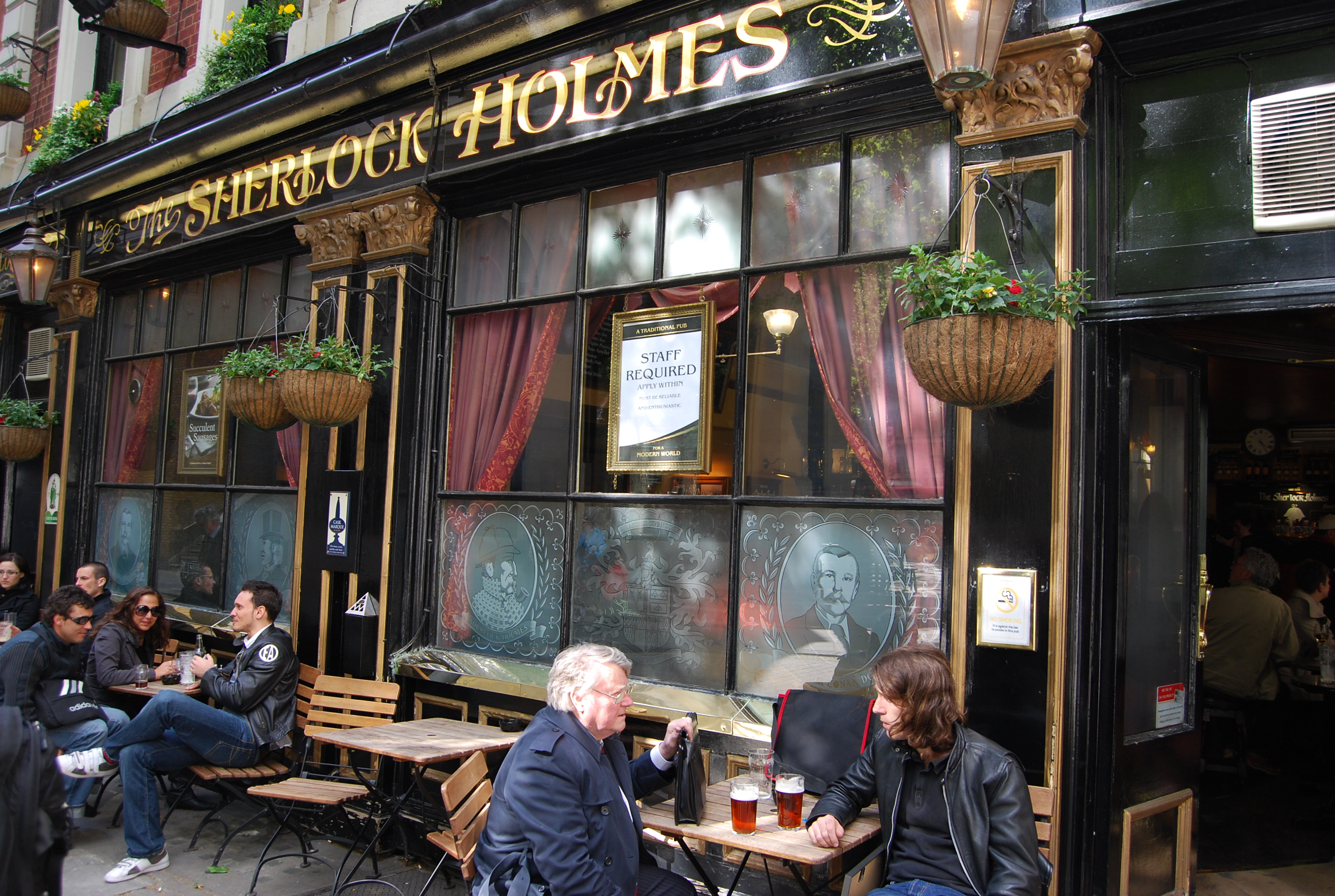 Sherlock Holmes pub, London